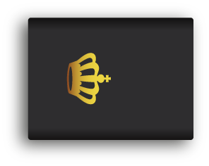 Rangen van de Nederlandse politie, epauletten (schuifpassanten) t.b.v. het huidige en het nieuwe (na 2014) uniform.